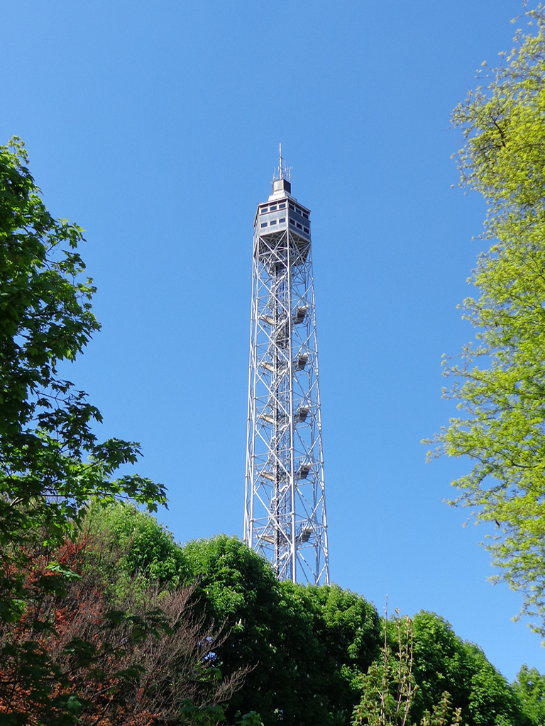 Milano, la Torre Branca vista dal Parco Sempione.